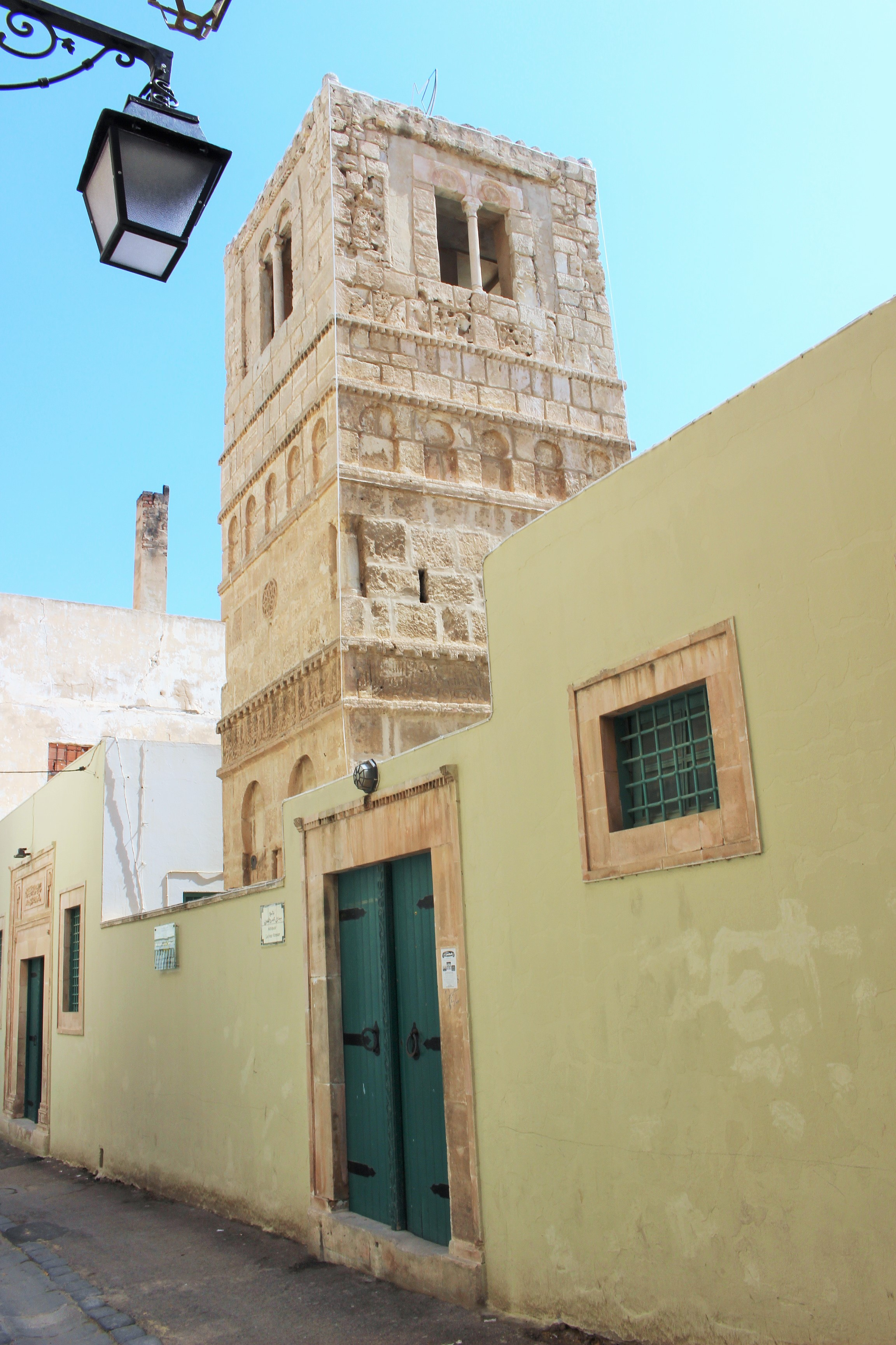 Mosquée de Sidi-Amor